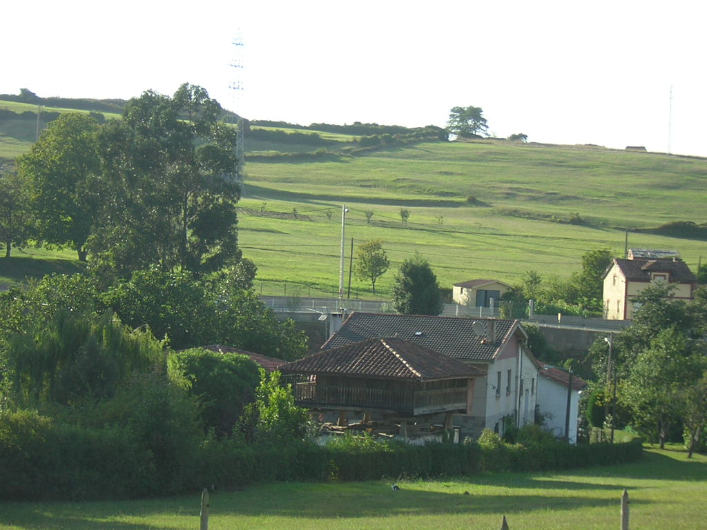 Imagen de El Molín, uno de los barrios de la parroquia de Molleda, Corvera de Asturias, España